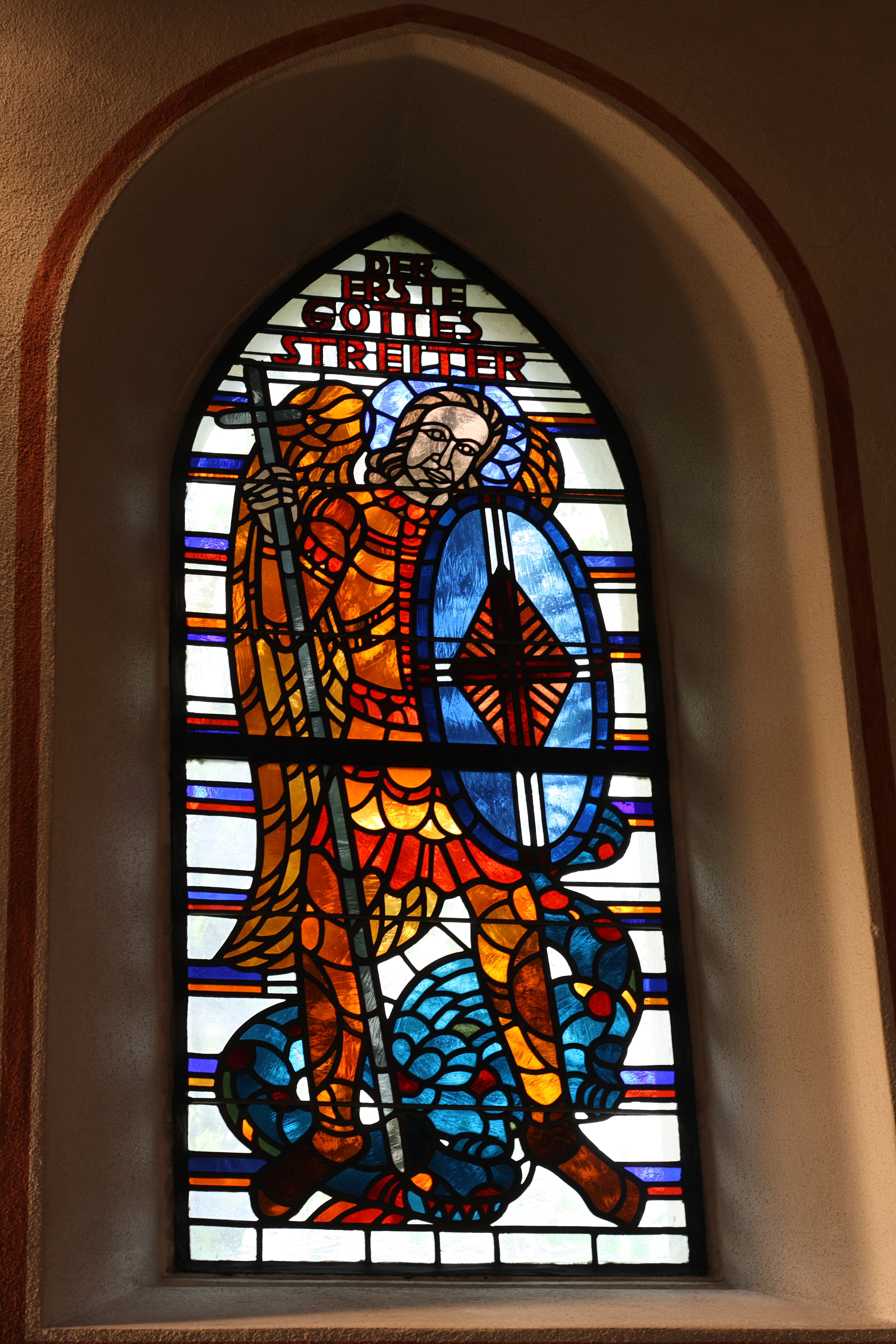 Bleiglasfenster in der katholischen Pfarrkirche St. Martinus in Dom-Esch, Darstellung: Erzengel Michael